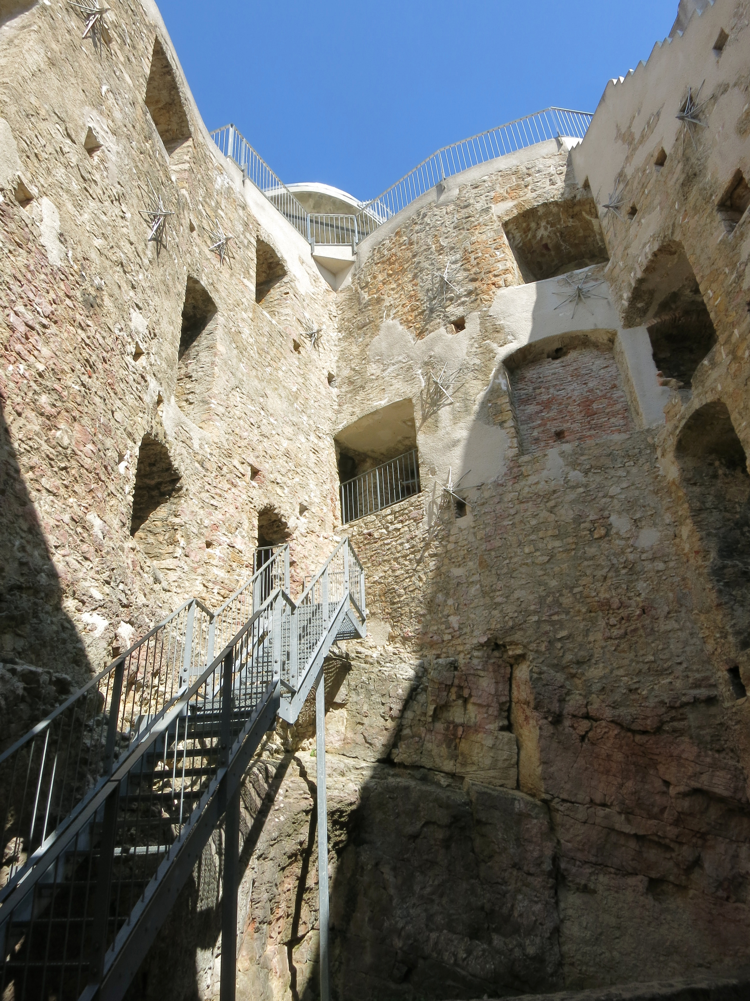 Innenansicht der Ruine Homburg